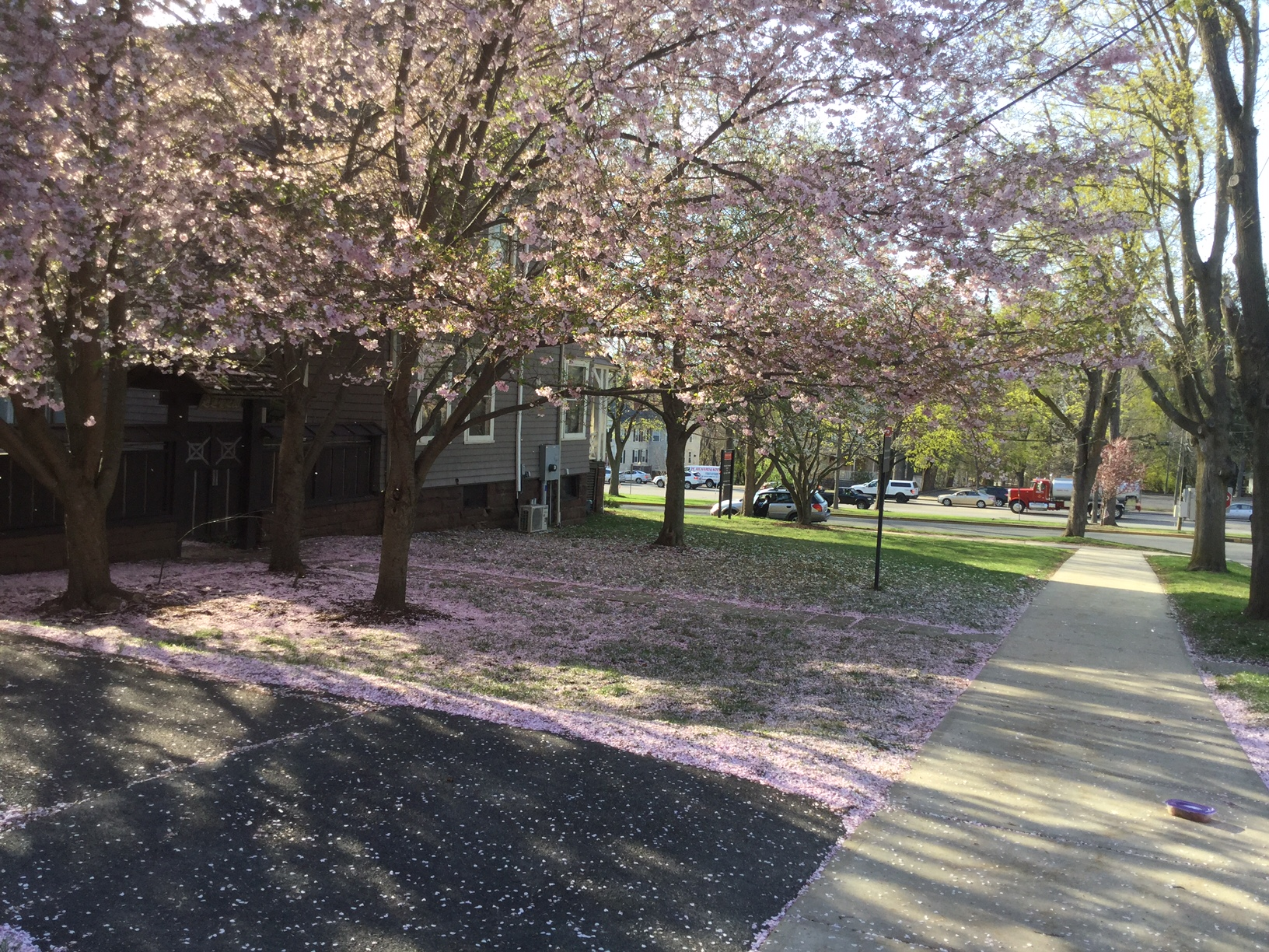 Shoyoan Teien of Wesleyan University